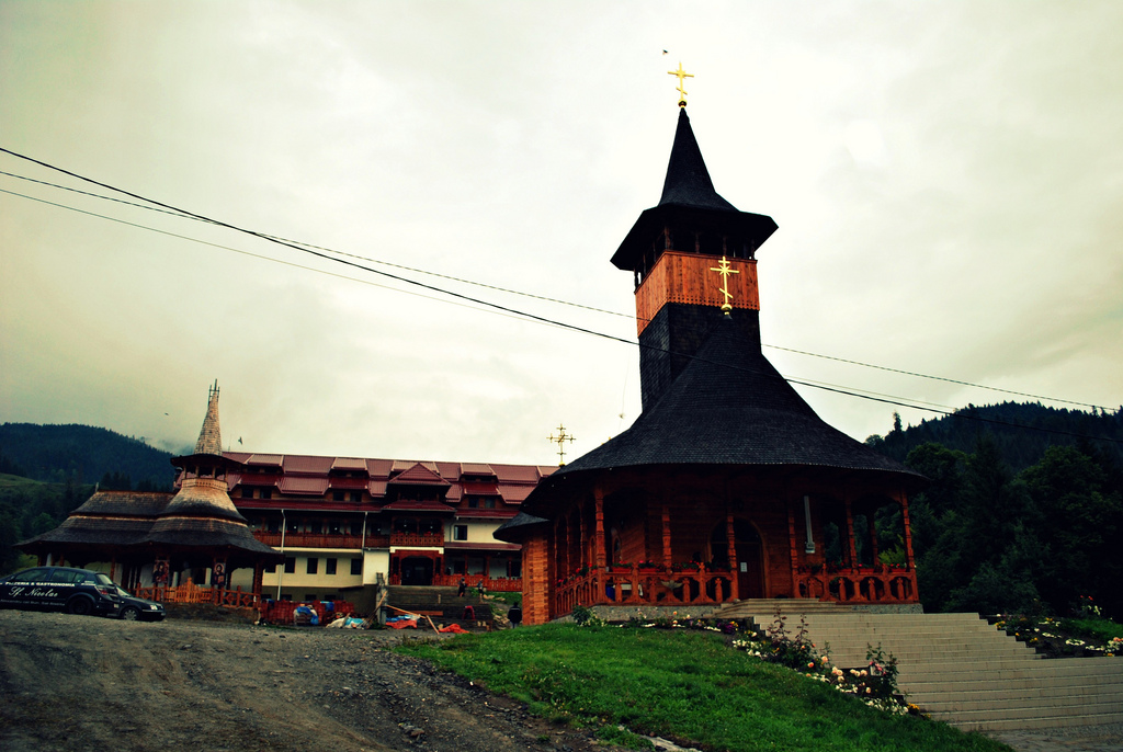 Ansamblul bisericii "Sf. Gheorghe" sat Petru Vodă; comuna Poiana Teiului Romania